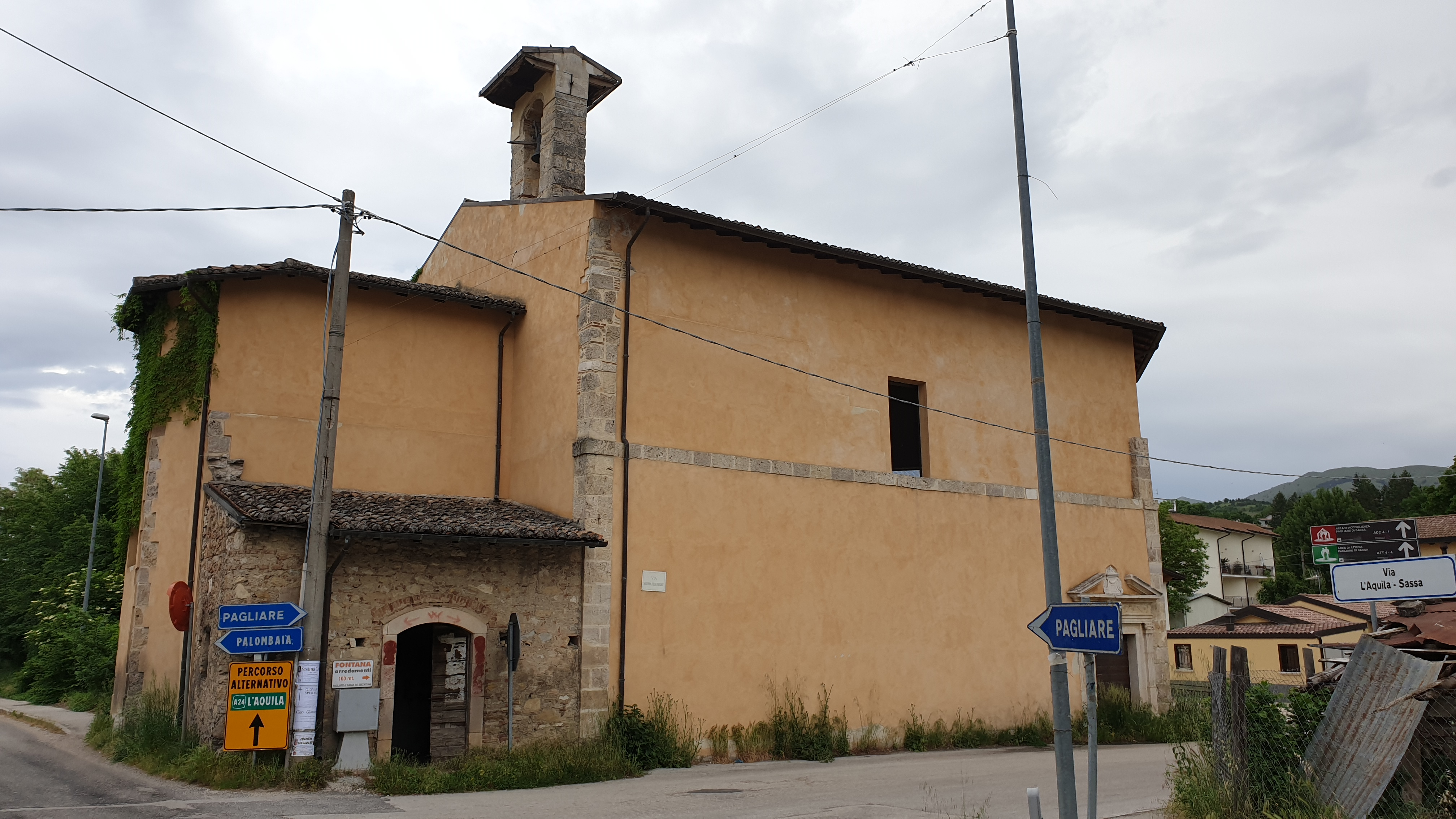 Chiesa della Madonna delle Pagliare (L'Aquila)